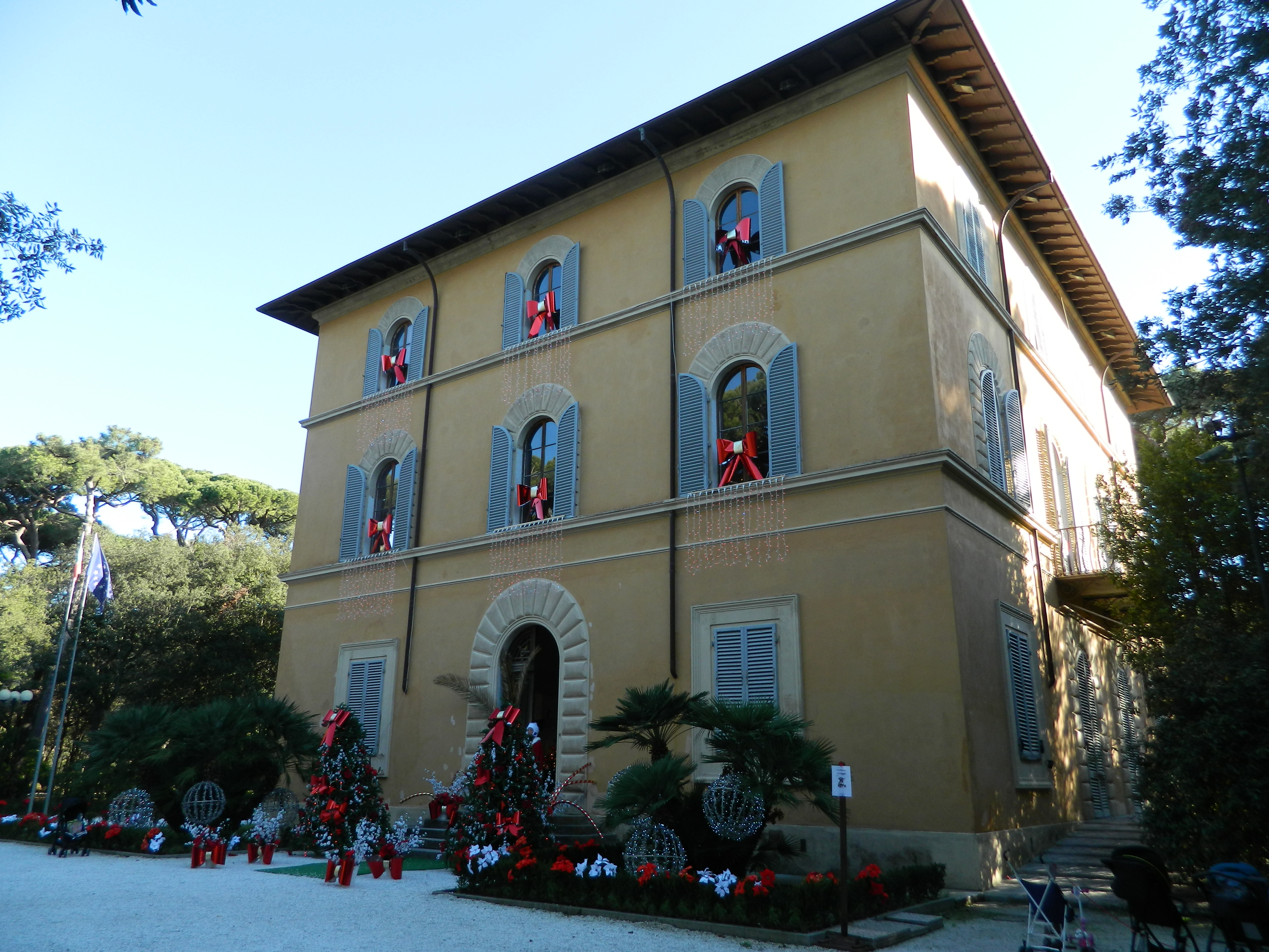 Villa Versiliana durante il periodo natalizio